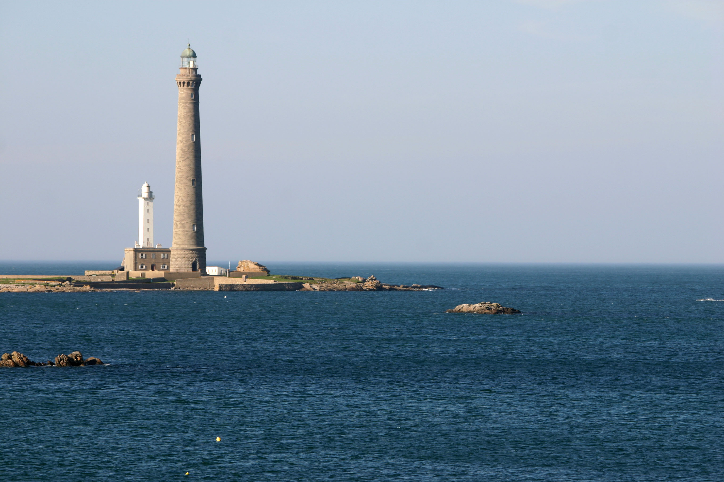 Die zur westbretonischen Gemeinde Plouguerneau gehörende Insel l'île Vierge mit ihren beiden Leuchttürmen